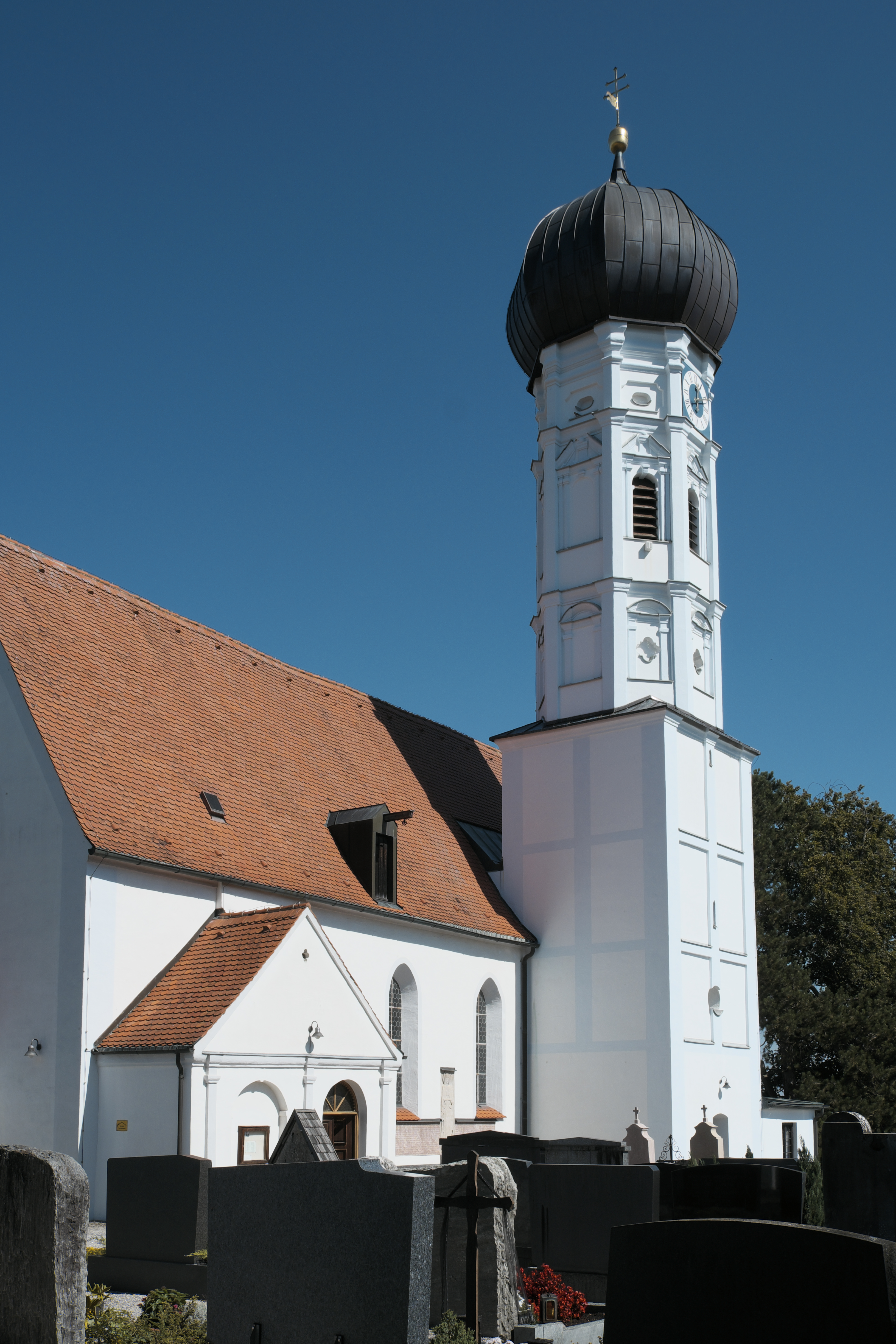 Katholische Pfarrkirche Mariä Geburt in Alling im Landkreis Fürstenfeldbruck (Bayern/Deutschland)